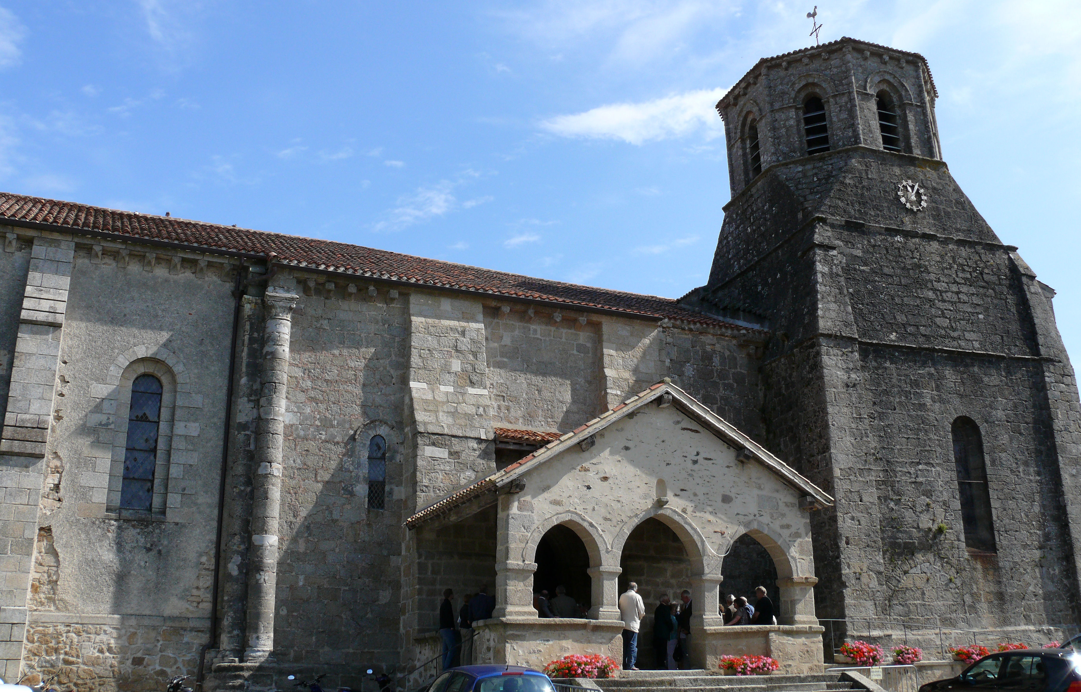 Secondigny - Eglise Sainte-Eulalie